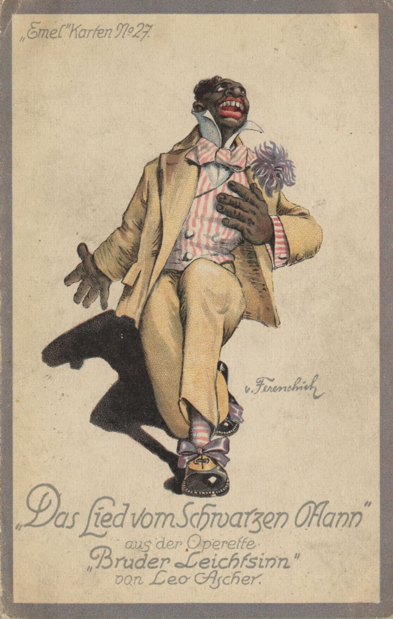 Illustration zu „Das Lied vom Schwarzen Mann“ aus der Operette „Bruder Leichtsinn“ von Leo Ascher. Uraufführung: 28. Dezember 1917, Bürgertheater, Wien.